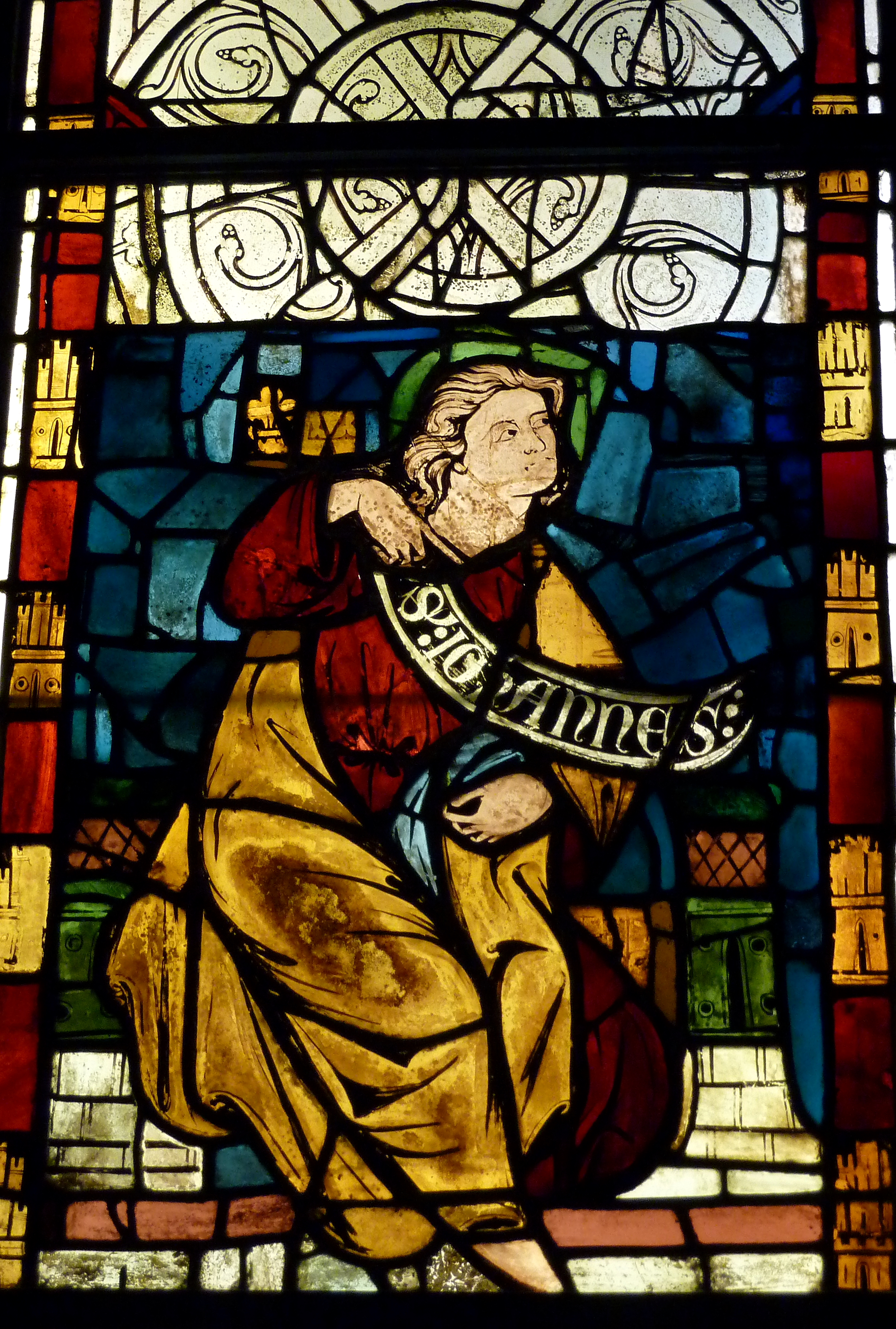 Bleiglasfenster im Musée National du Moyen Âge (Hôtel de Cluny) in Paris; Herkunft: Schlosskapelle in Rouen, vor 1270; Darstellung: Apostel Johannes